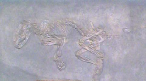 Macrocranion tupaiodon